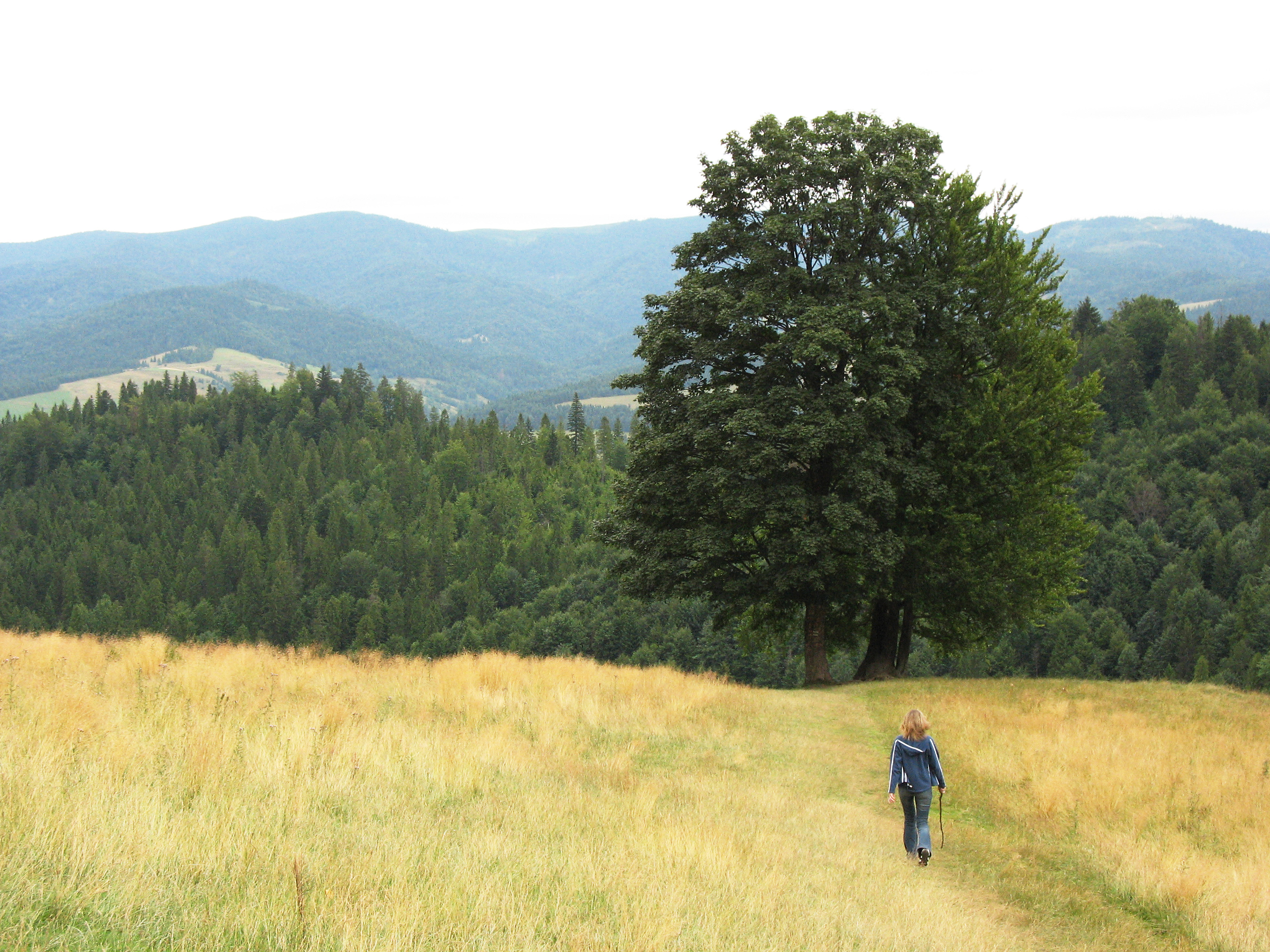 Polana pod Wysoką